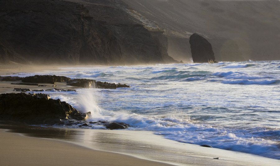 Das wilde Cofete mit dem Roque del Morro